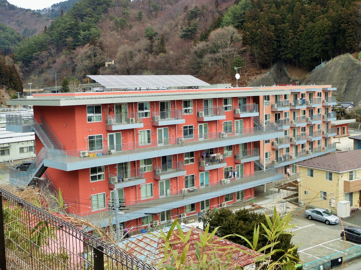 天神復興公営住宅 Canon IXY 3